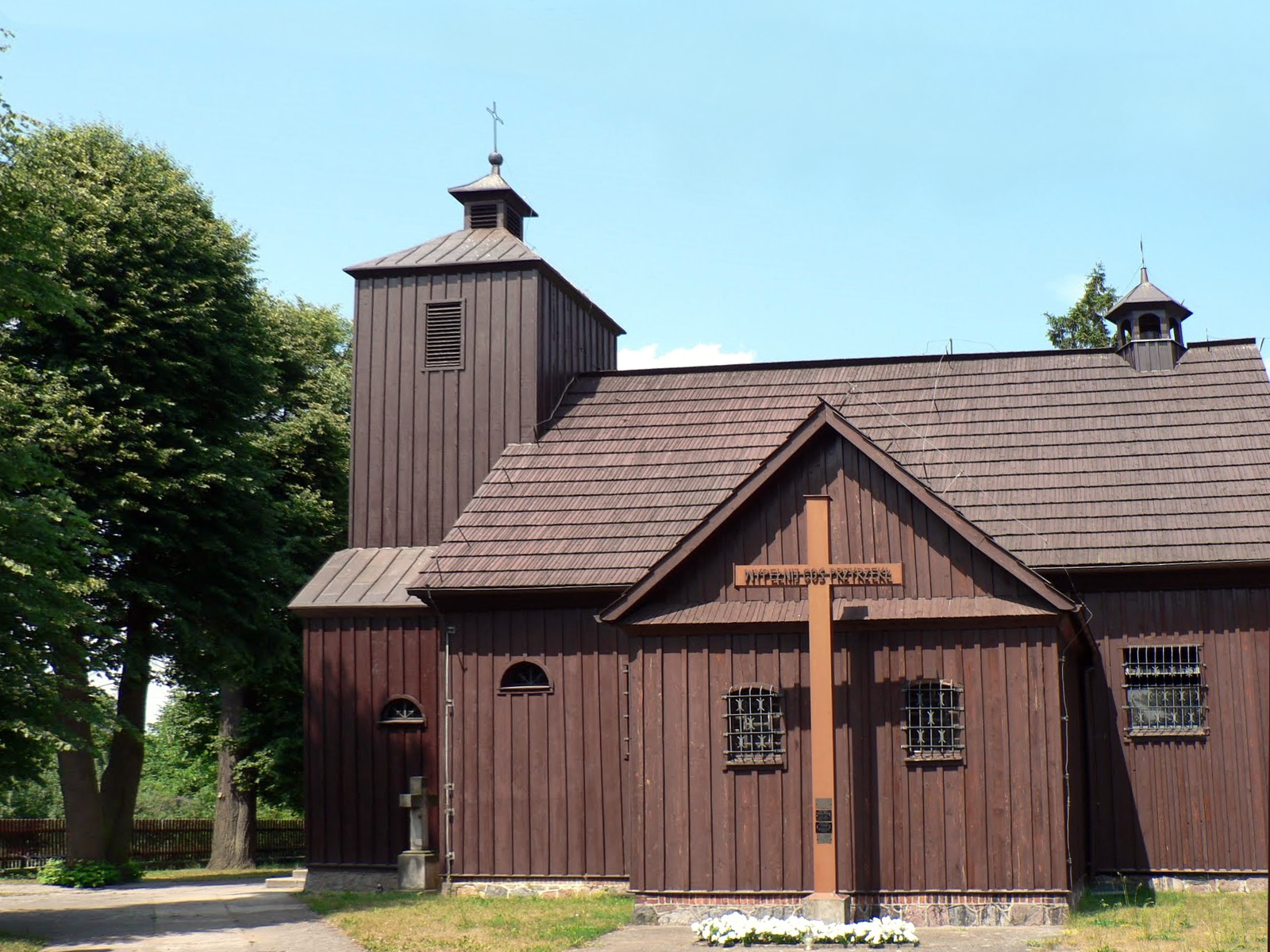 Pawłowo 27 - drewniany kościół pw. św. Marcina z 1762 r. (zabytek nr 448/A z 1.02.1969)